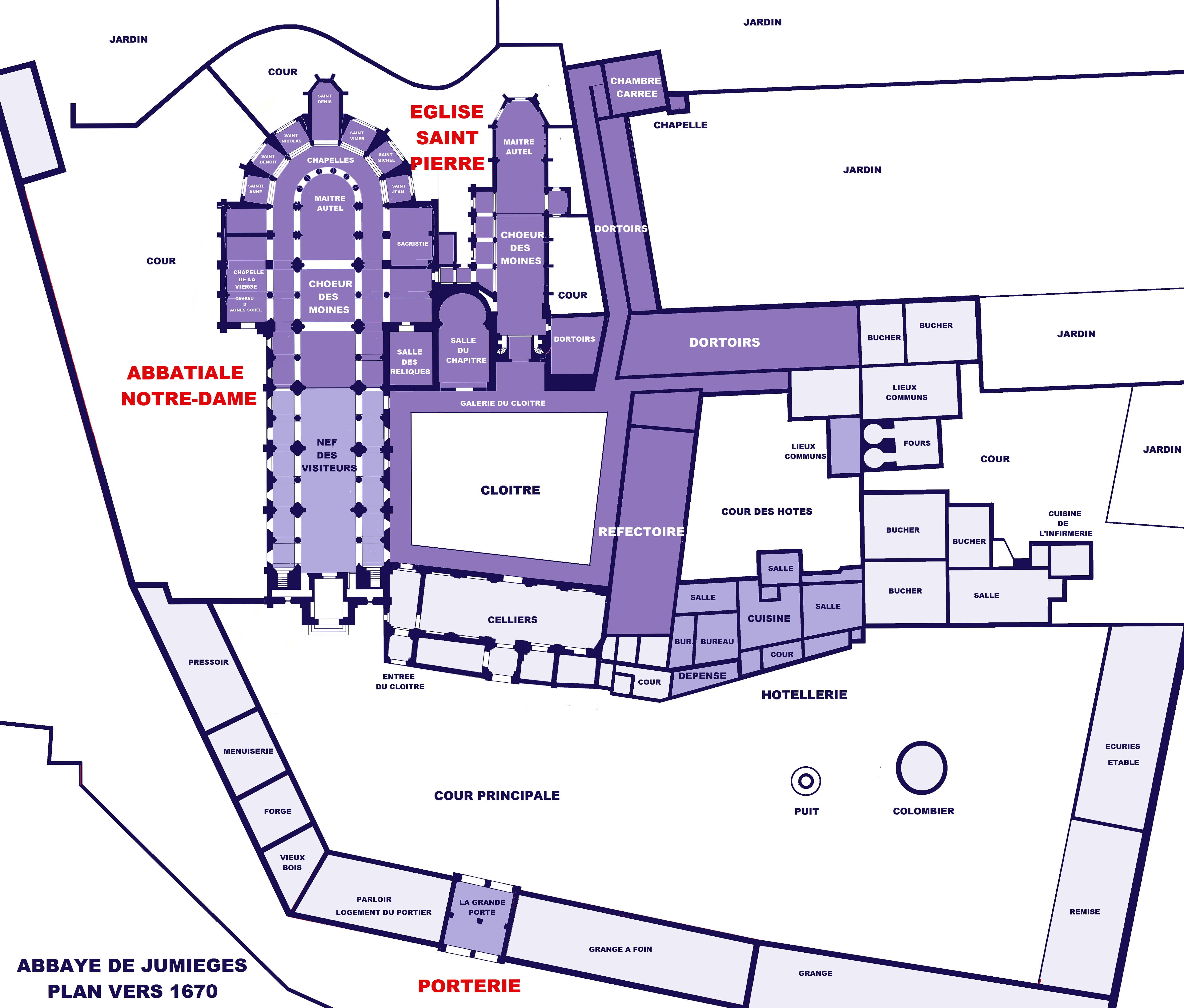 Jumieges, Plan de l'abbaye vers 1670 (Pierre Delavigne)